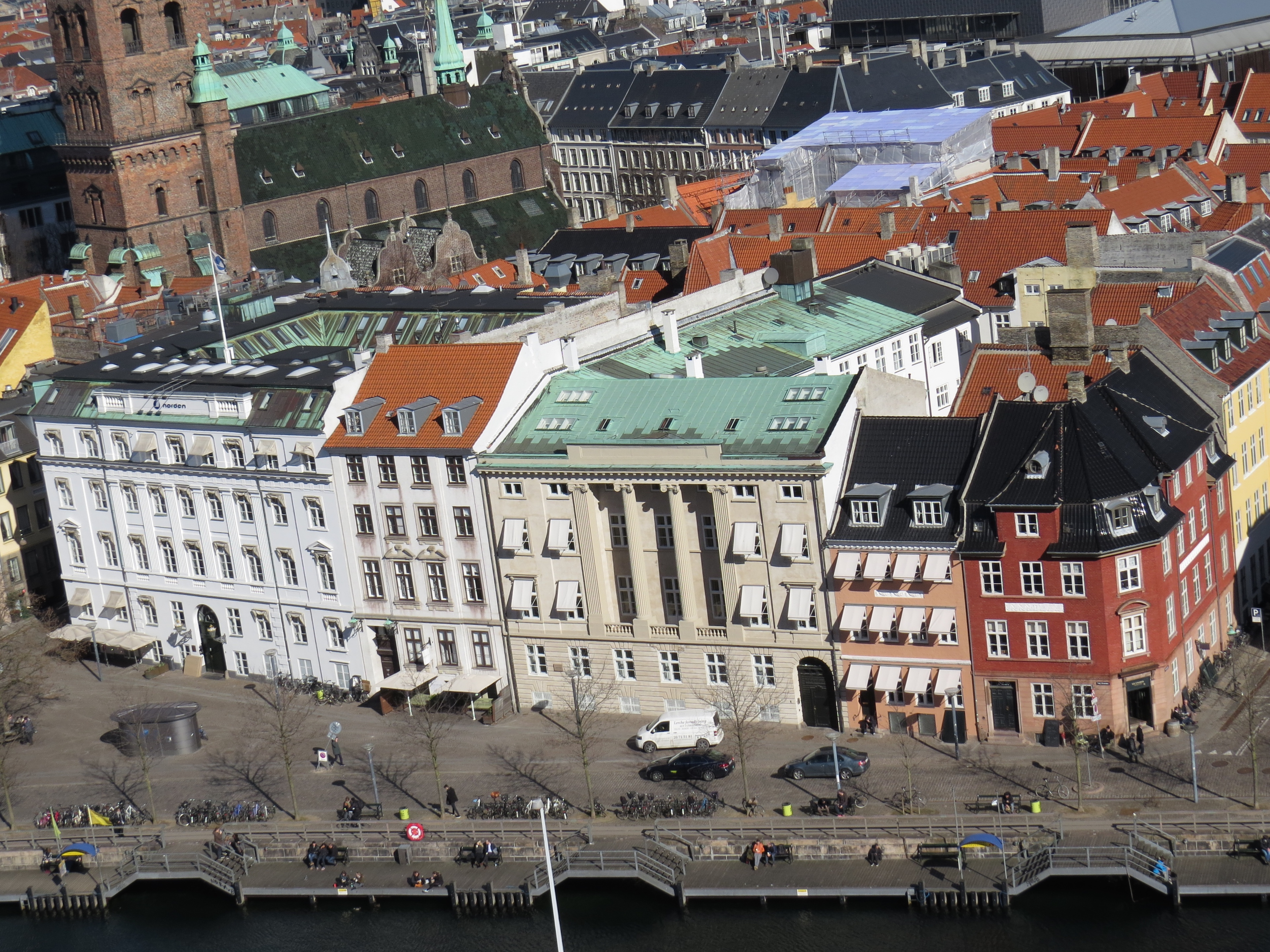 Ved Stranden, København